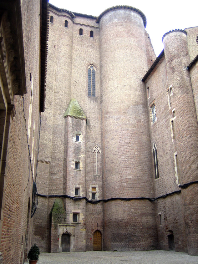 Museo Toulouse-Lautrec en Albi (Francia)